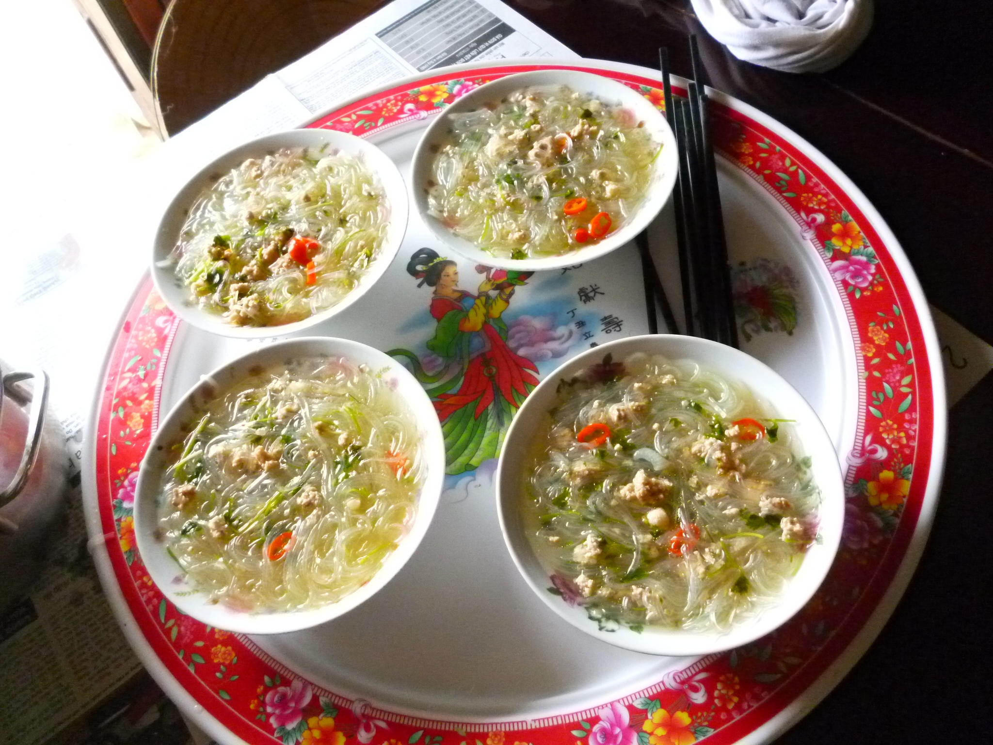 Miến thịt bằm